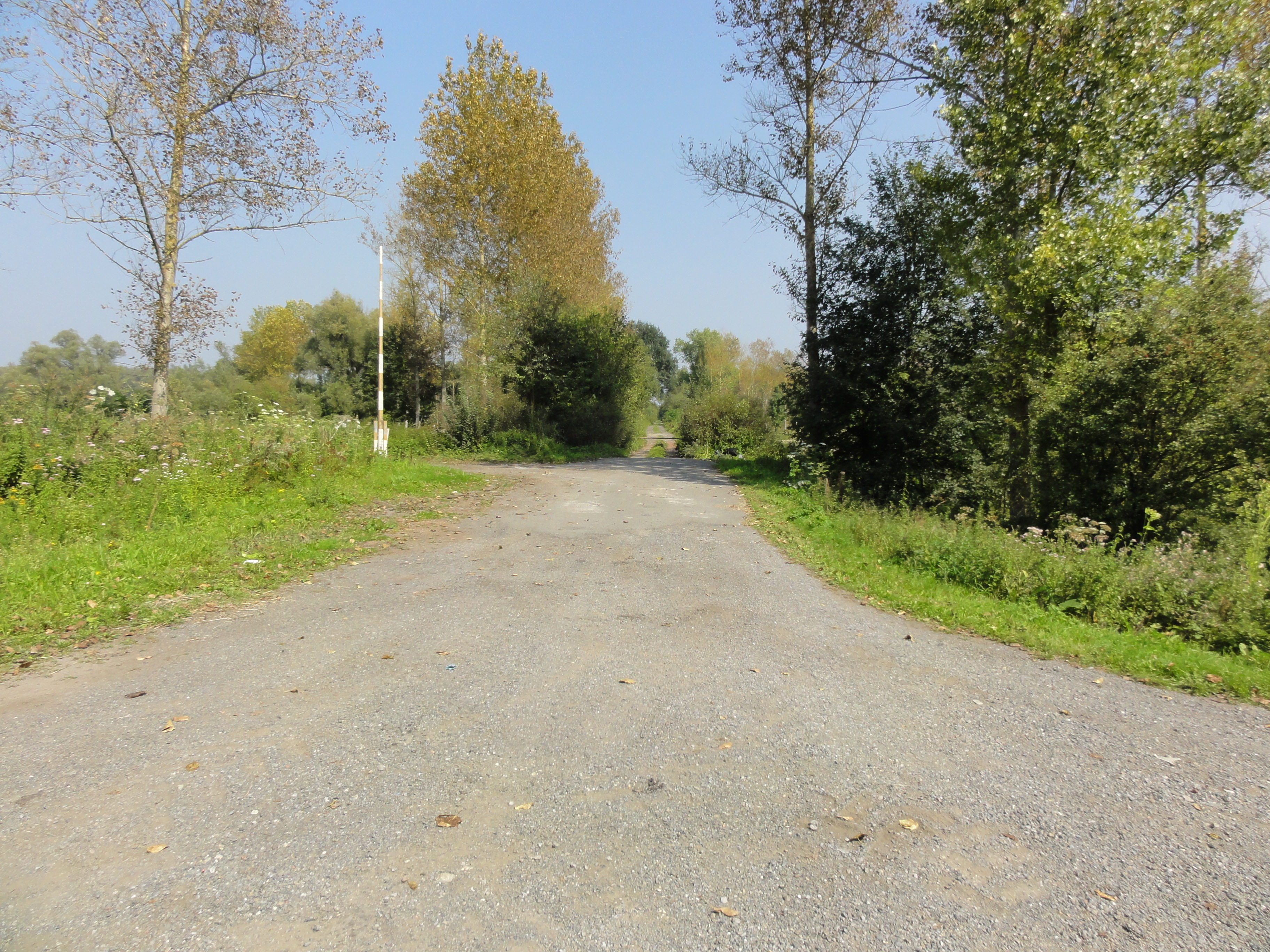 Terril n° 234 dit Stock de Sables de Fond, fosse Saint-Pierre de la Compagnie des mines de Thivencelle, Thivencelle, Nord, Nord-Pas-de-Calais, France.